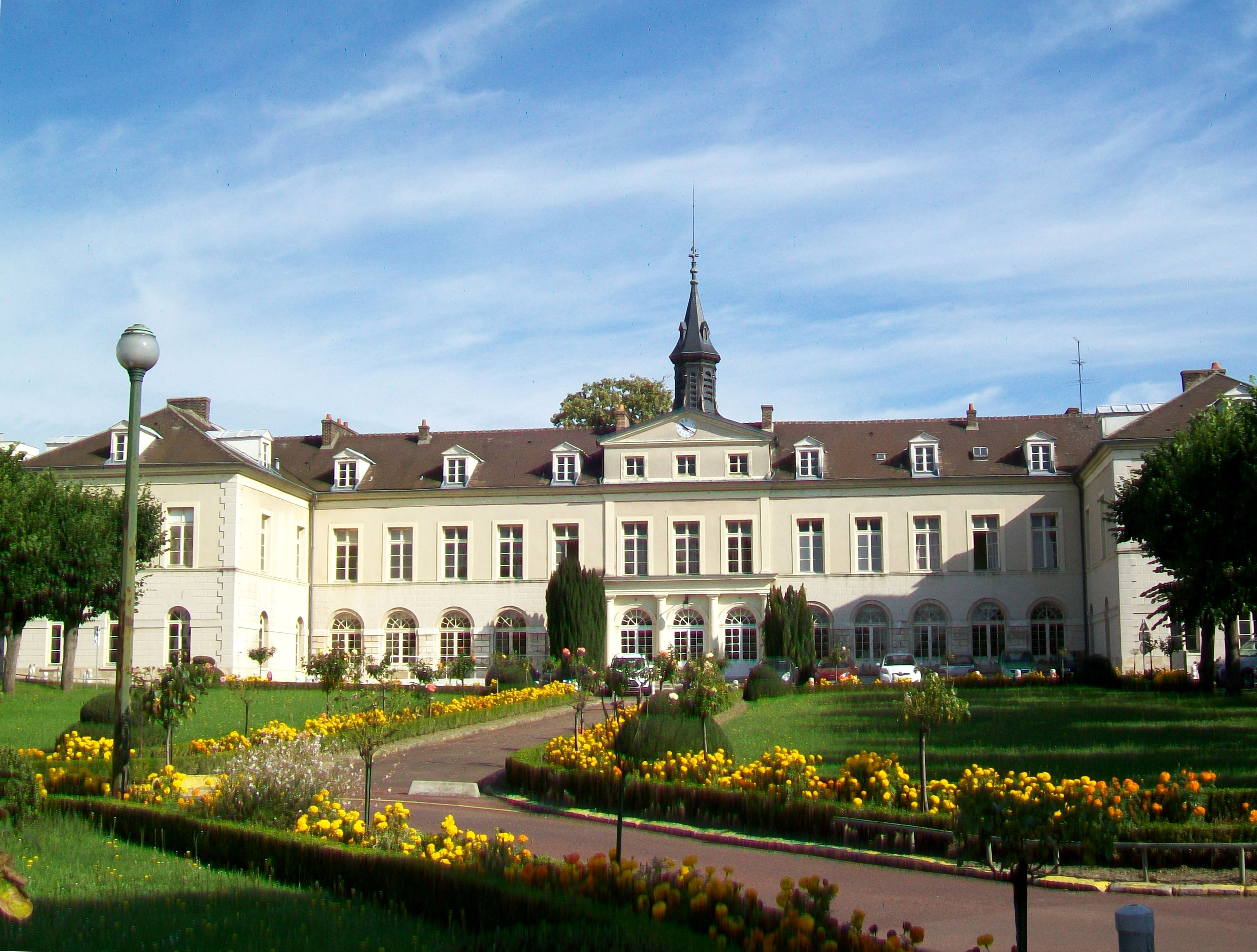 L'Hôtel-dieu, bâtiment ancien du centre hospitalier général de Gonesse, construit en 1839 en remplacement de l'Hôtel-dieu médiéval se situant en face, rue Pierre-de-Theillay.